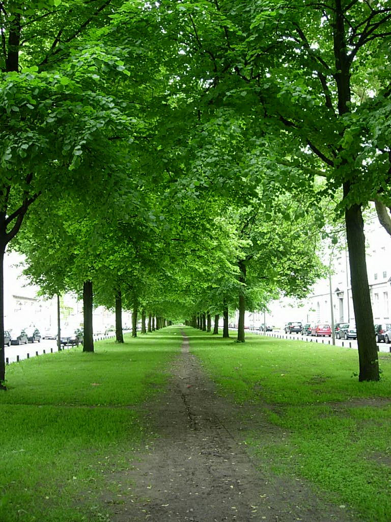 Die Mittelachse der Palmaille in Altona-Altstadt. Die Straße wurde 1636 bis 1639 von Otto V. von Schauenburg angelegt.